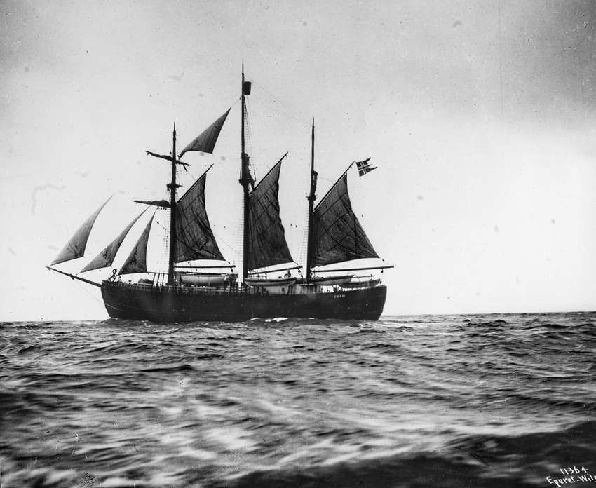 Beskrivelse: "Fram under fulle seil, sørover i 1910." Fotograf: A. B. Wilse Arkivreferanse: Riksarkivet, UD Avdeling for presse, kultur og informasjon, Uc1, Roald Amundsen Fram Description: "Full sail ahead for Fram, going south, 1910". Photo: A. B. Wilse